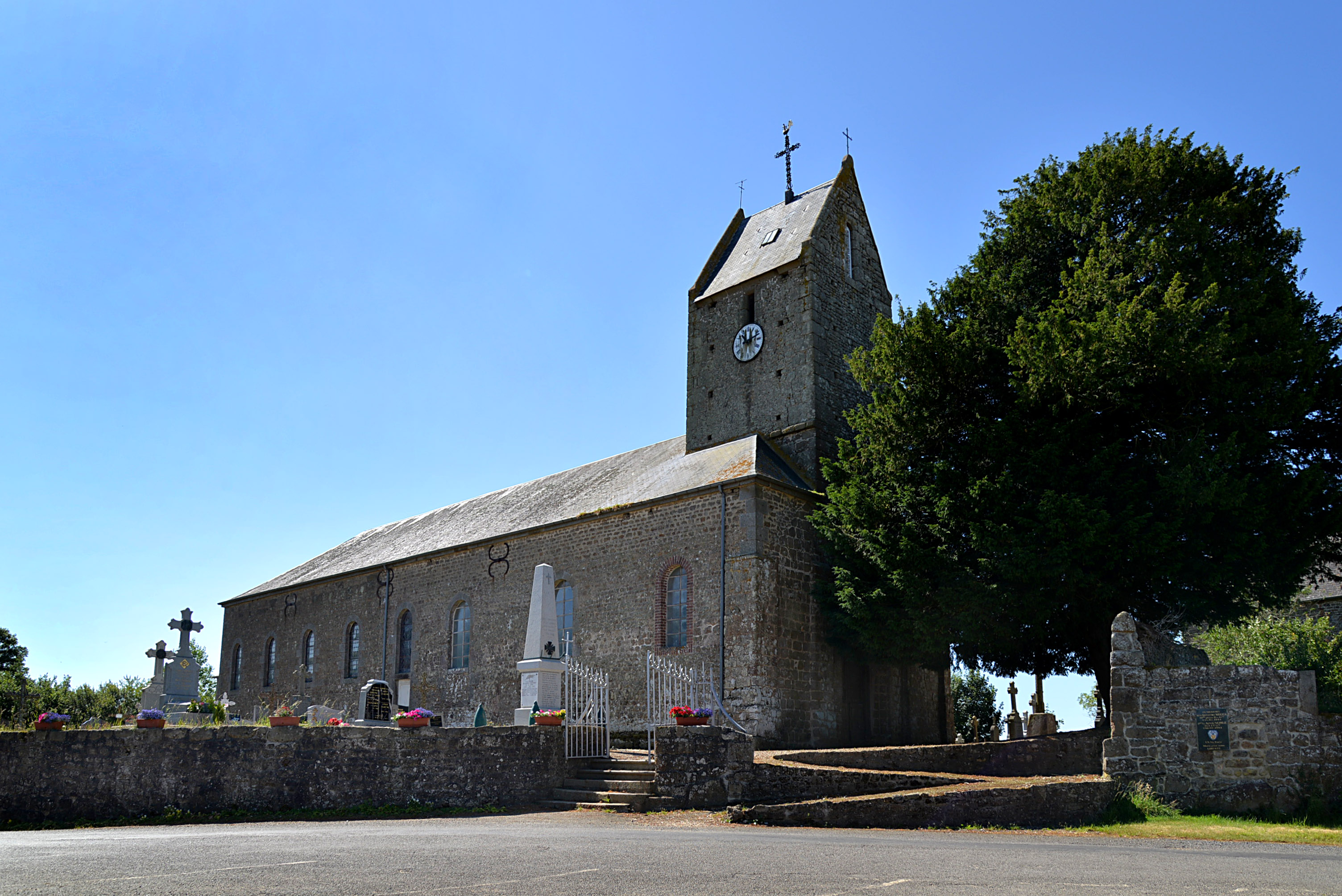 Saint-André-de-Briouze (Orne)